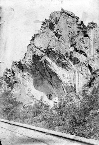 Fonds Trutat - Photographie ancienne Cote : TRU B 588 Localisation : Fonds ancien (S 30) Original non communicable Titre : Abri de Plantade, Bruniquel, septembre 1889 Auteur : Trutat, Eugène Rôle de l’auteur : Photographe Lieu de création : Bruniquel (Tarn-et-Garonne) Date de création : 1889 Mesures : : 18 x 13 cm Observations : Notes de la main de Trutat : "obj. anast. Turillon, papier Eastman" Mot(s)-clé(s) : -- Rocher -- Paroi rocheuse -- Falaise -- Colline -- Voie ferrée -- Arbre -- Végétation -- Buisson -- Eté -- Automne -- Bruniquel (Tarn-et-Garonne) -- Monclar-de-Quercy (Tarn-et-Garonne ; canton) -- Midi-Pyrénées (France) -- 19e siècle, 4e quart Médium : Photographies -- Négatifs sur papier -- Noir et blanc -- Turillon -- Eastman -- Paysages Bibliothèque de Toulouse. Domaine public